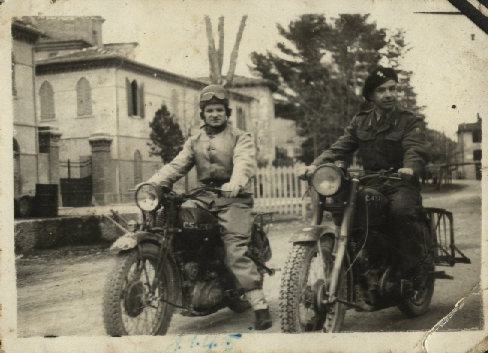 Żołnierze 7 pułku pancernego: kpr. Szajerka i NN oficer w Rumini